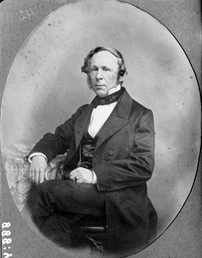 Eestimaa rüütelkonna peamees Otto Gustav von Lilienfeld (1805-1895)